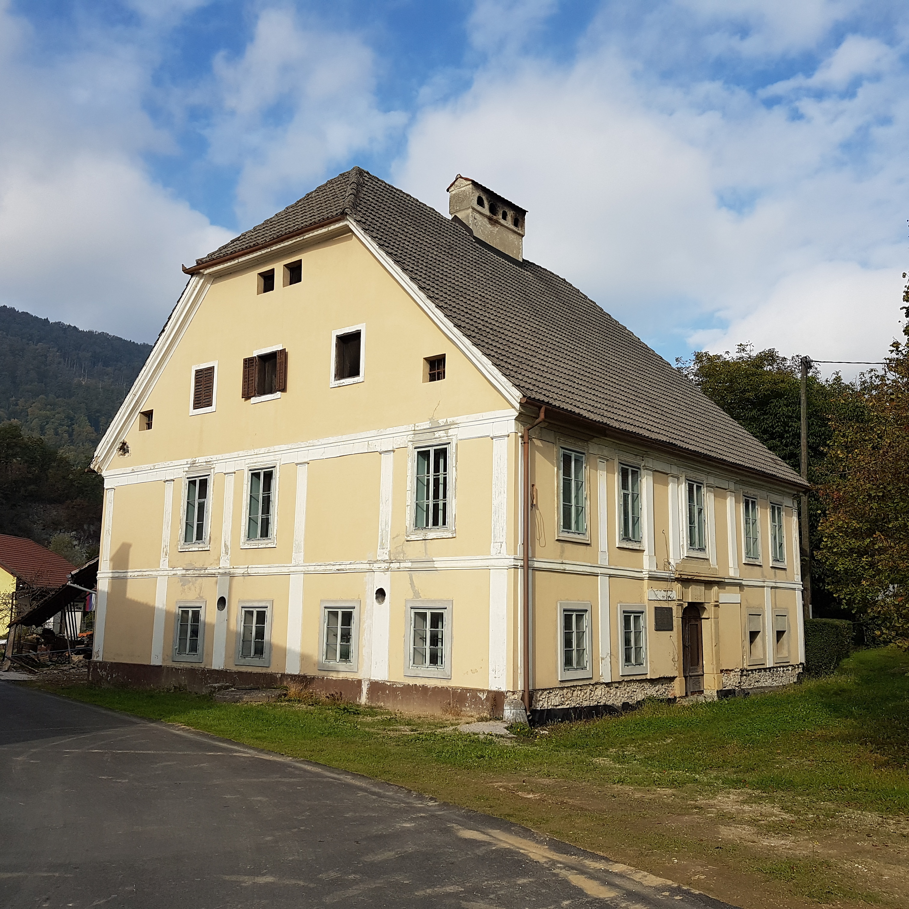 Hiša v Letušu